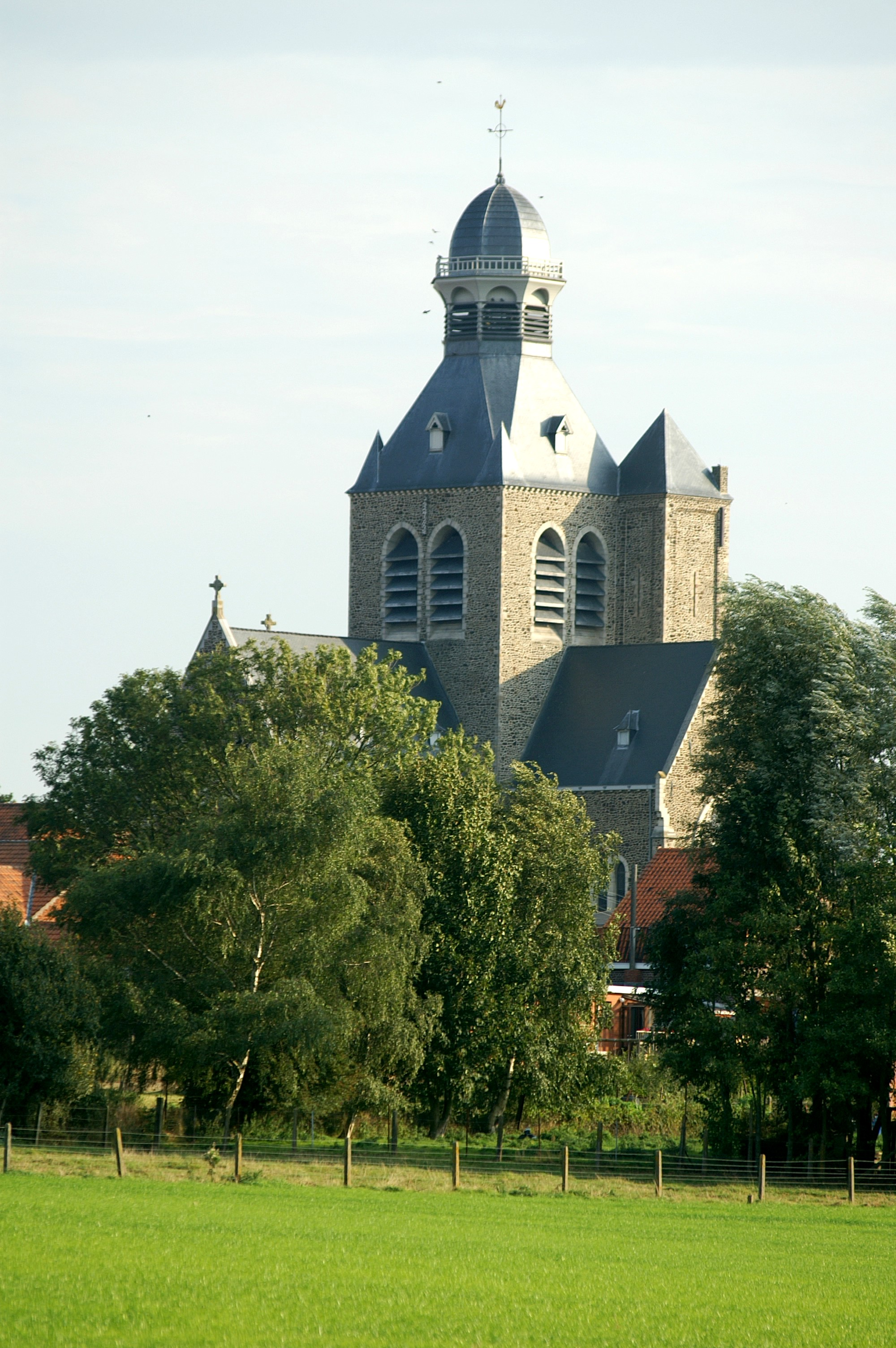 Eigen werk